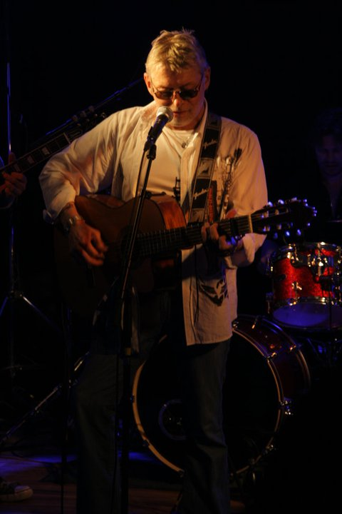 K.M. Myrland